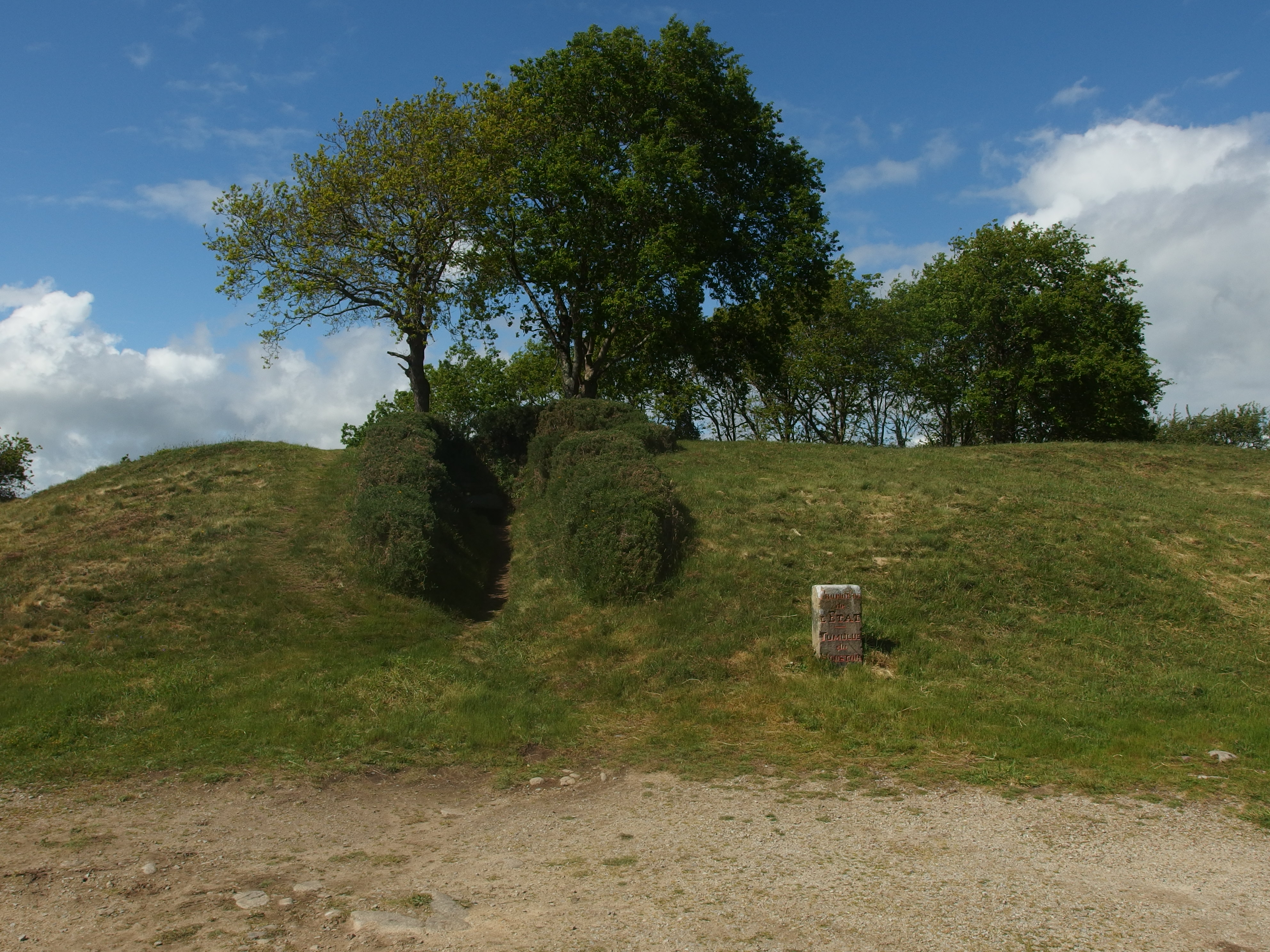 Vue générale du Tumulus du Moustoir à Carnac